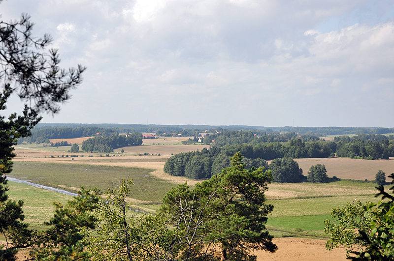 Utsikt över Kiladalen från Berga Kulle naturreservat i Nyköpings kommun.